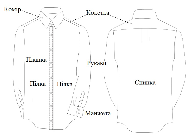 Схема крою чоловічої сорочки з назвами деталей українською мовою